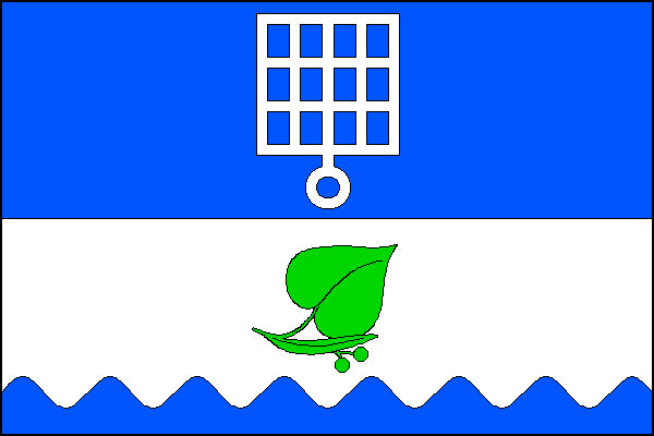 vlajka, Vlkov, okres Žďár nad Sázavou